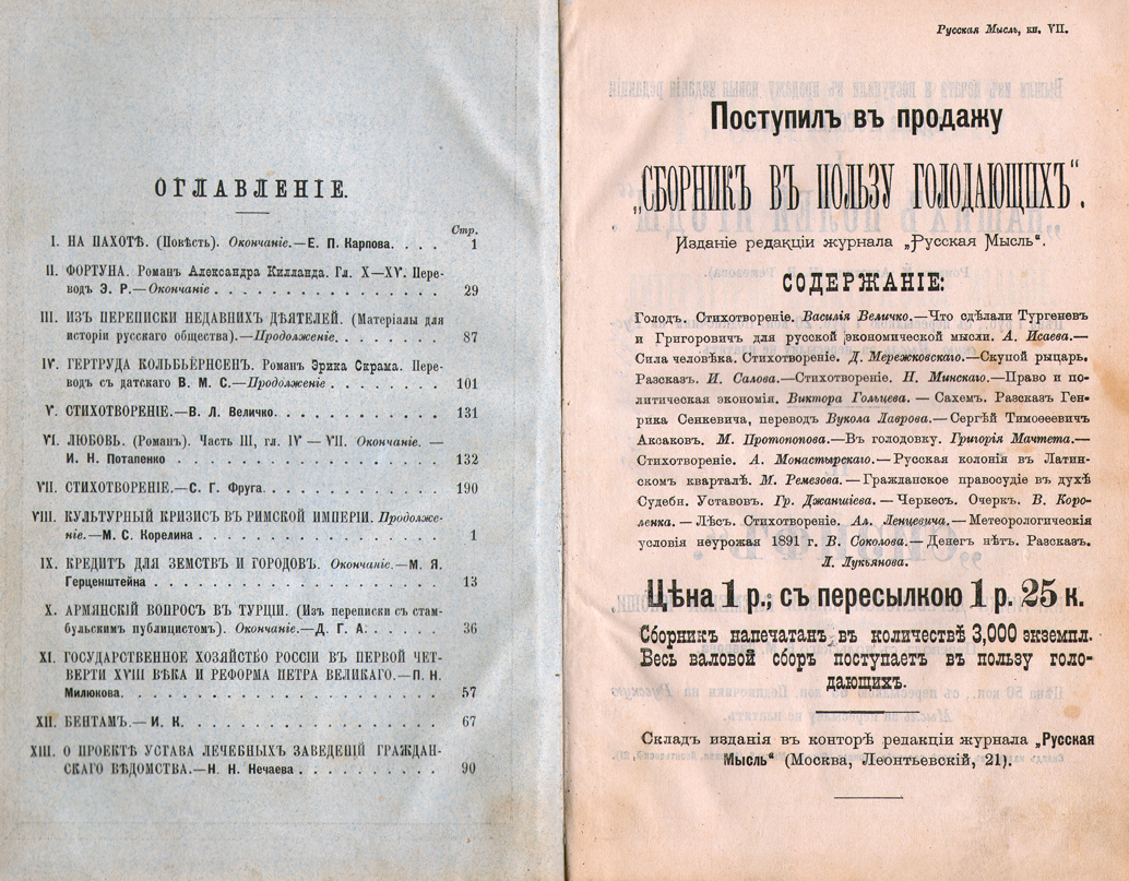 Оглавление журнала «Русская мысль», 1892, июль